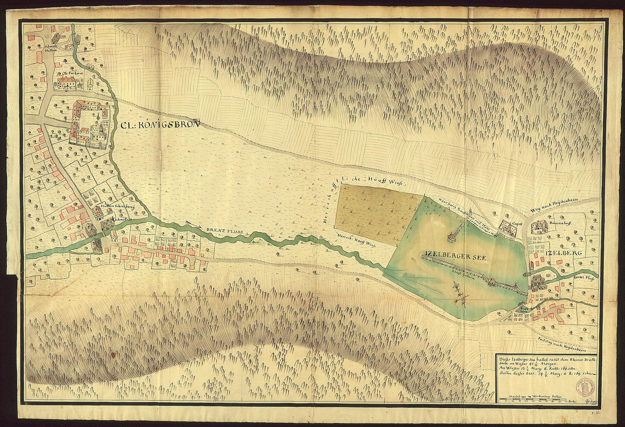 Zisterzienserabtei Königsbronn - Klosterareal und Gebäude der Eisenwerke (Faktorei). Seenatlas von J. A. Riediger 1737/38.